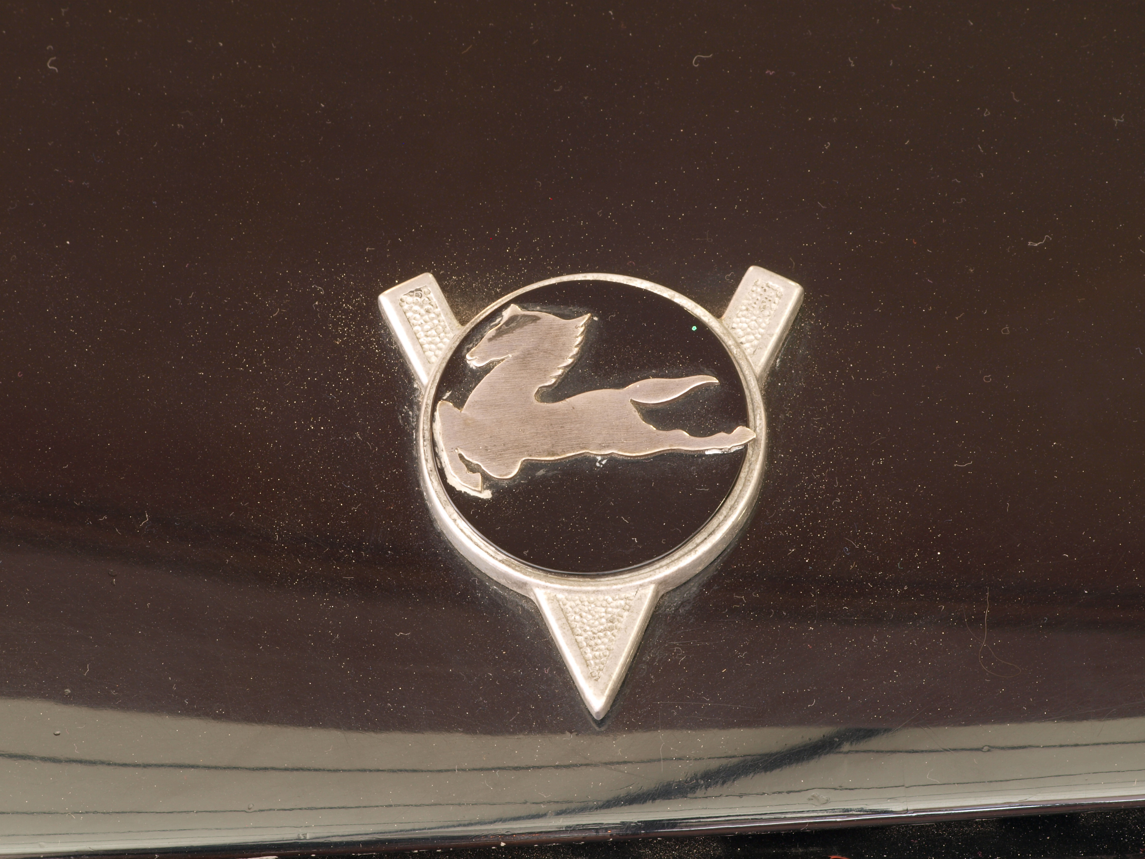 Photographed at the Caramulo museum, 'Museu do Caramulo', Caramulo, Portugal. OLYMPUS DIGITAL CAMERA